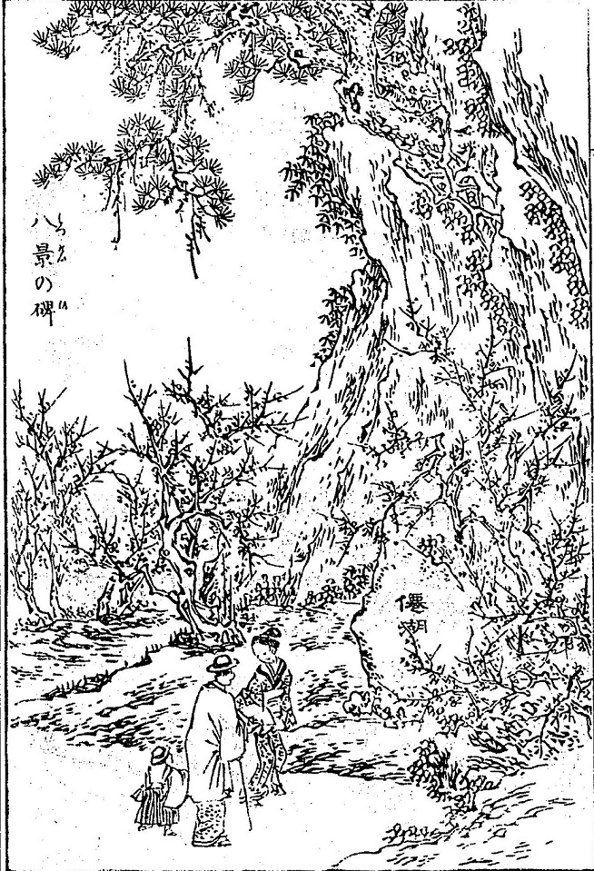 偕楽園の水戸八景「仙湖暮雪」の碑図(『茨城常盤公園攬勝図誌』（1885）上巻 松平俊雄編述 W249-2 国会図書館デジタルコレクション コマ番号21 改編 国立国会図書館デジタルコレクション:インターネット公開（保護期間満了）